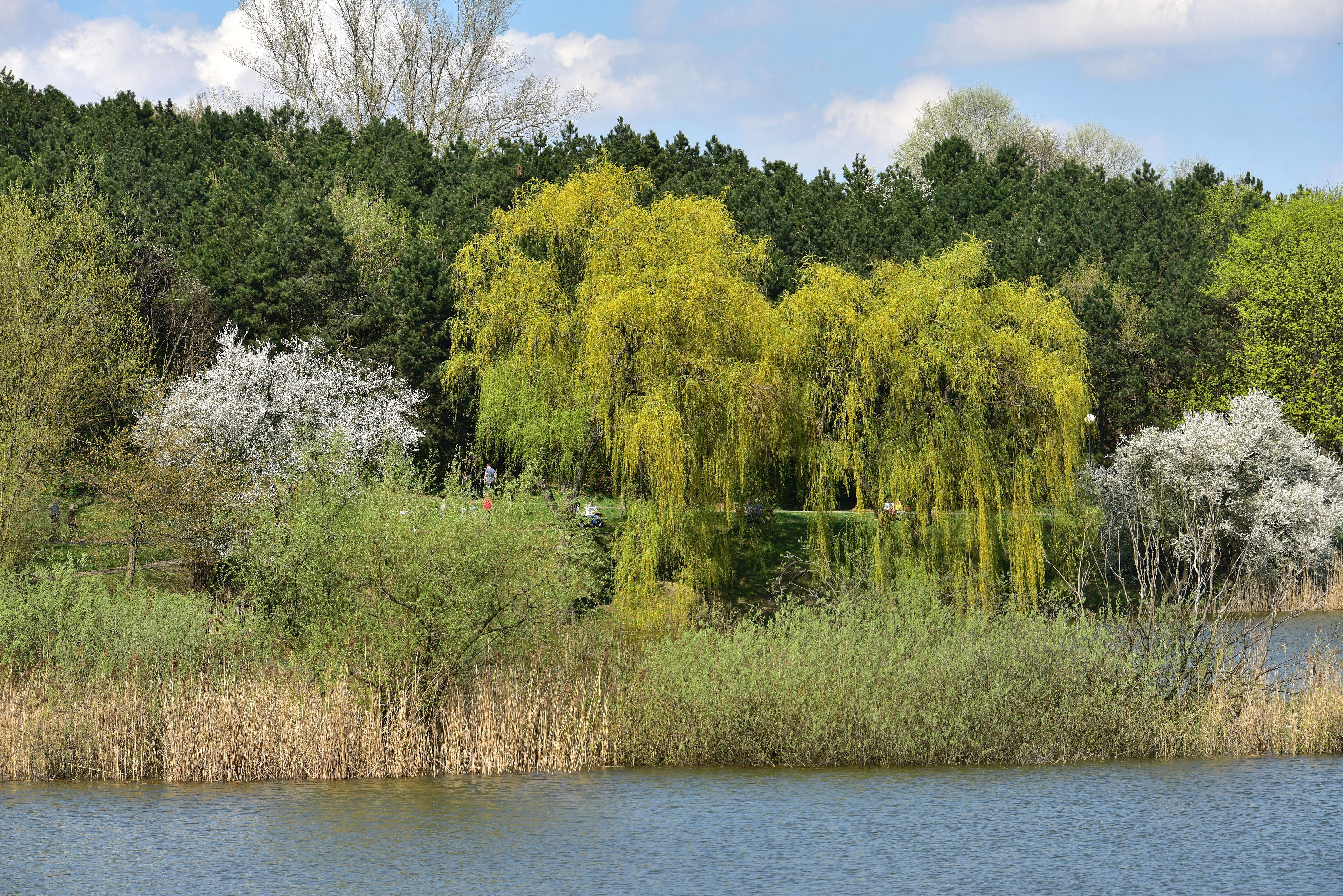 Park Szczęśliwicki w Warszawie